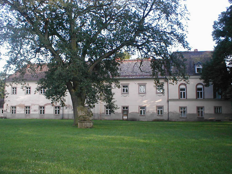 Nordflügel des Schlosses in Remplin, Mecklenburg-Vorpommern, Deutschland. Der Nordflügel ist der einzige Teil des Schlosses, der nach dem Brand von 1940 erhalten ist.